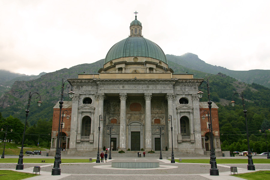 La basilica nuova del Santuario di Oropa (BI)